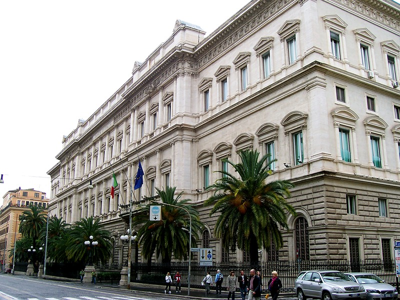 Roma - Palazzo Koch (Banca d'Italia)